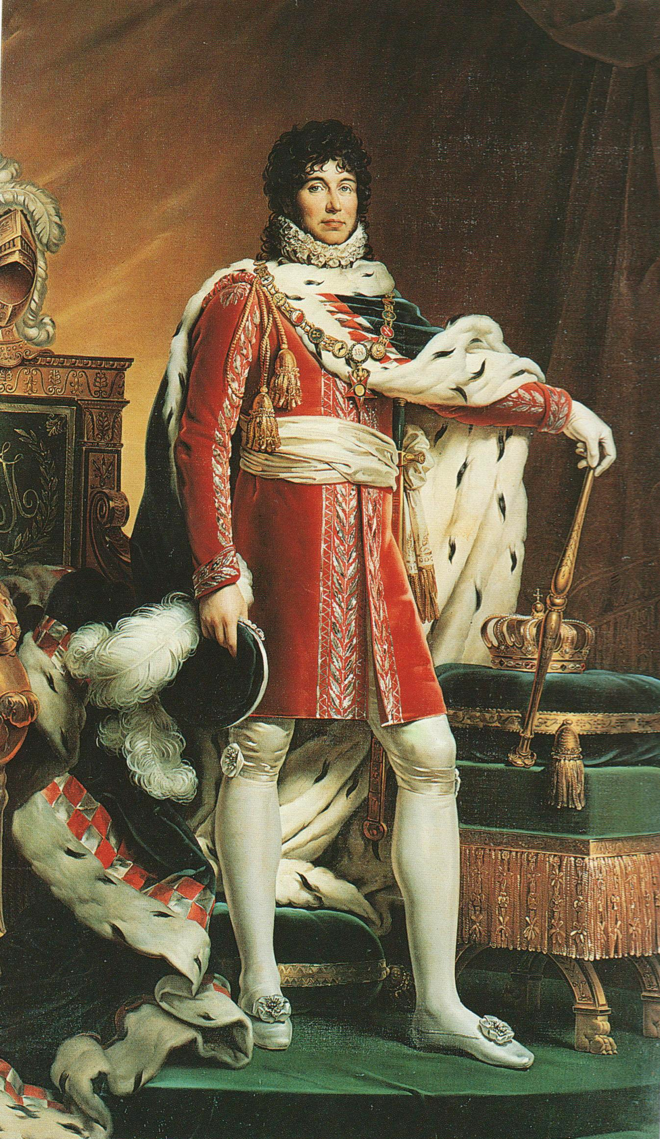 Joachim Murat avec le collier de l'Ordre des Deux-Siciles